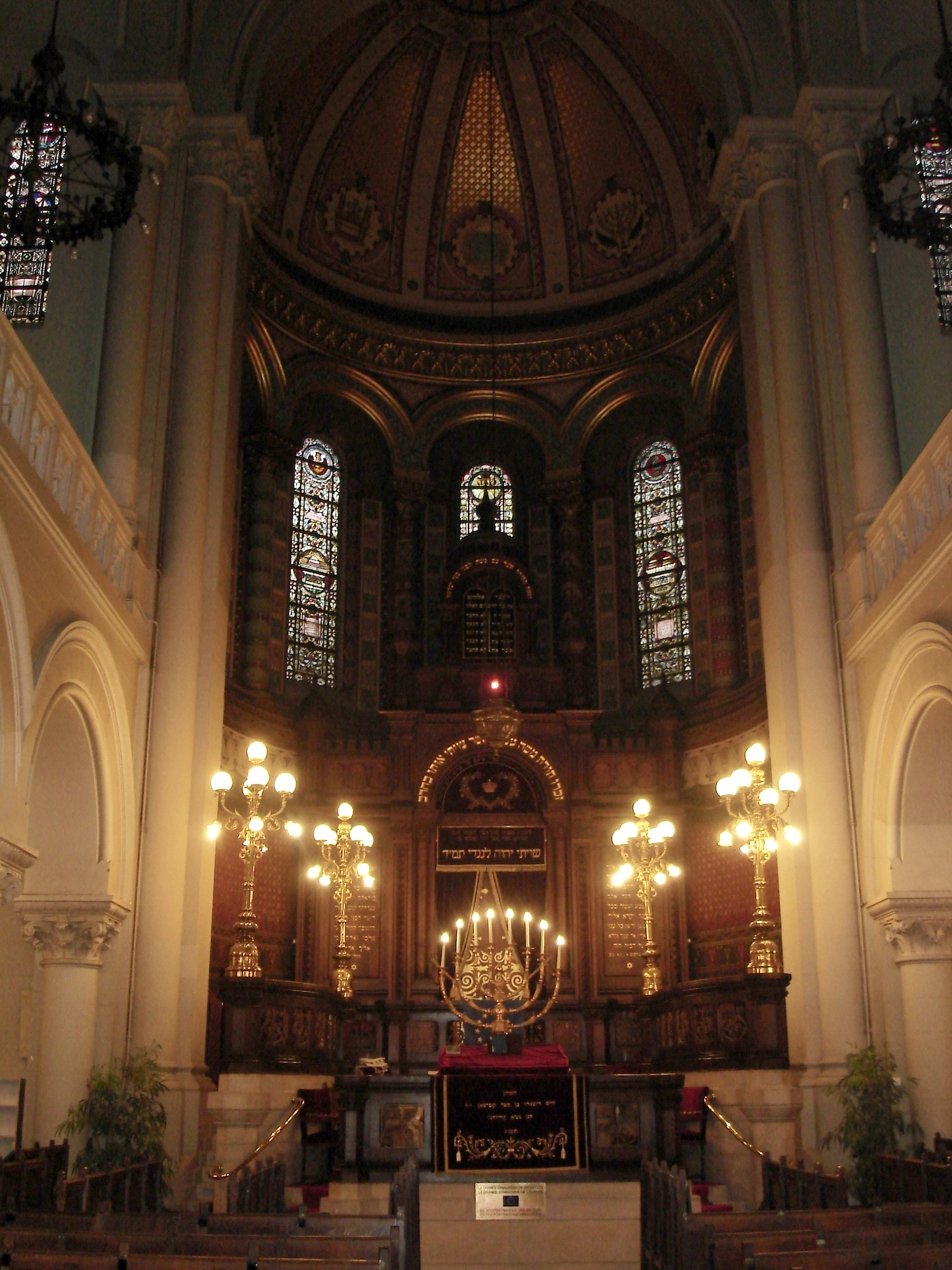 Grande synagogue de Bruxelles- Vue intérieure